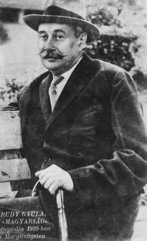 Krúdy Gyula a Margitszigeten Ismeretlen fényképész felvétele. Budapest, Margitsziget, 1929. Reprópozitív. (121x 73 mm). Petőfi Irodalmi Múzeum Művészeti Tára, ltsz.: 2697. Közli: Magyarság (Melléklet a Magyarság 1929. július 7-i számához. 4. 1.) A kép bal alsó sarkában a képaláírás: „Krúdy Gyula a 'Magyarság' regényírója 1929-ben a Margitszigeten". (forrás: P. Macht Ilona: Egy album képei (ötven év ötven kép tükrében))